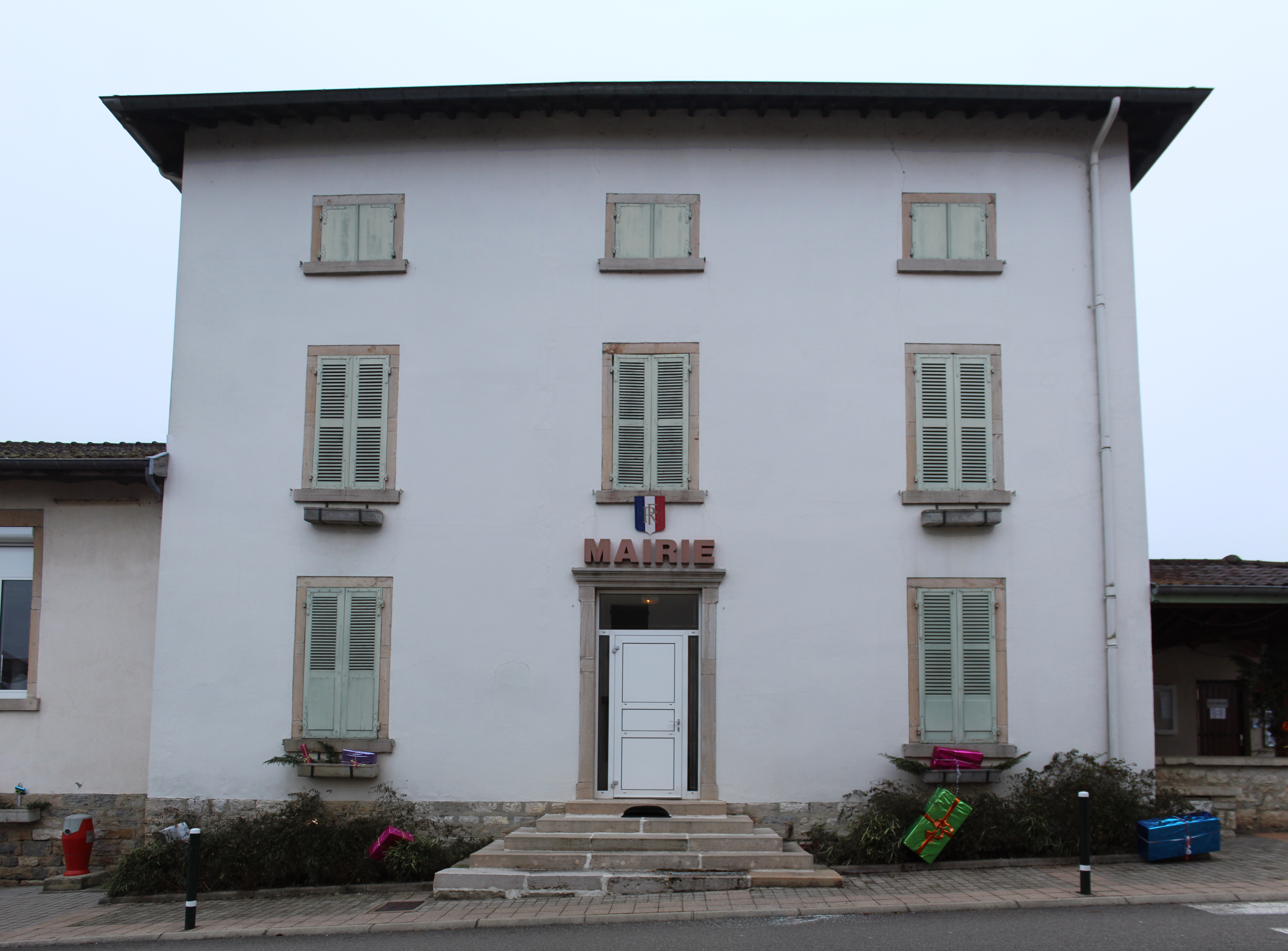 Mairie de Saint-Martin-le-Châtel.